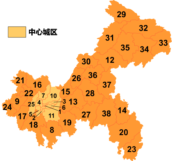 重庆市行政区划